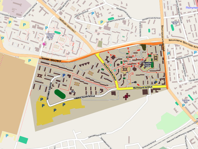 Мостицький масив